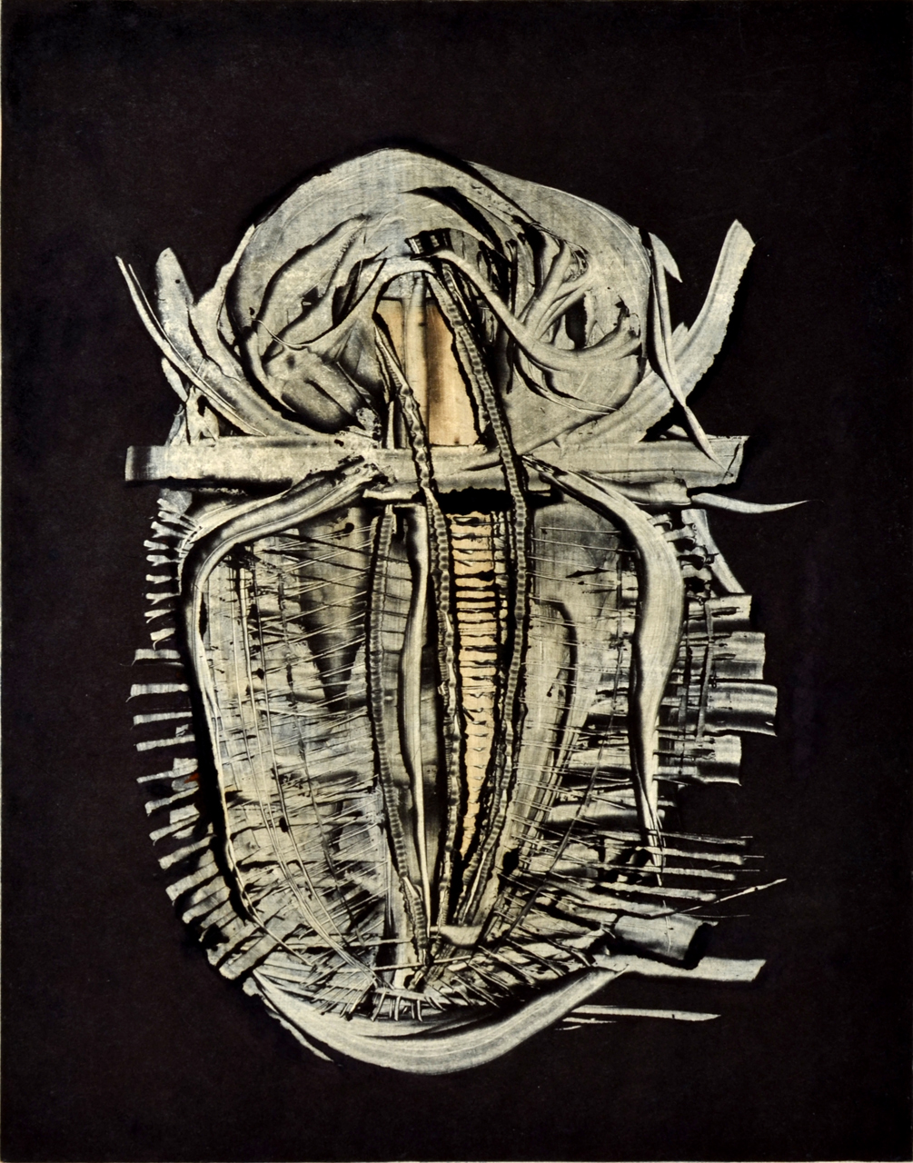 Oldřich Hamera, Jedinec, monotyp, 44x35 cm, 1972